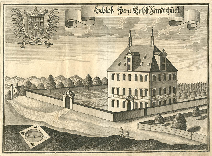 "Schloß Berg Nechst Landshuett", Schloß Berg, Landshut ("Adelmannschlösschen"), aus : Beschreibung des Churfürsten- u. Hertzogthumbs Ober- und Nidern Bayrn. Rentamt Landshut., 1723